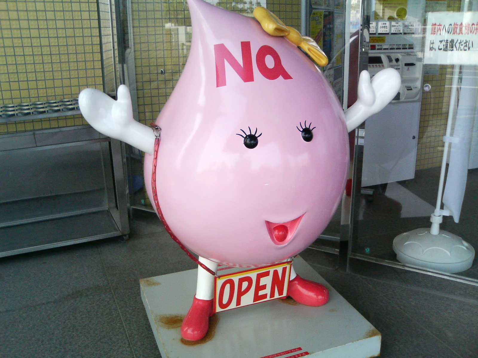 サイクル機構(旧動燃)マスコット・ナトリウム子ちゃん 撮影地: 茨城県大洗 撮影者: 投稿者 Category:人形の画像